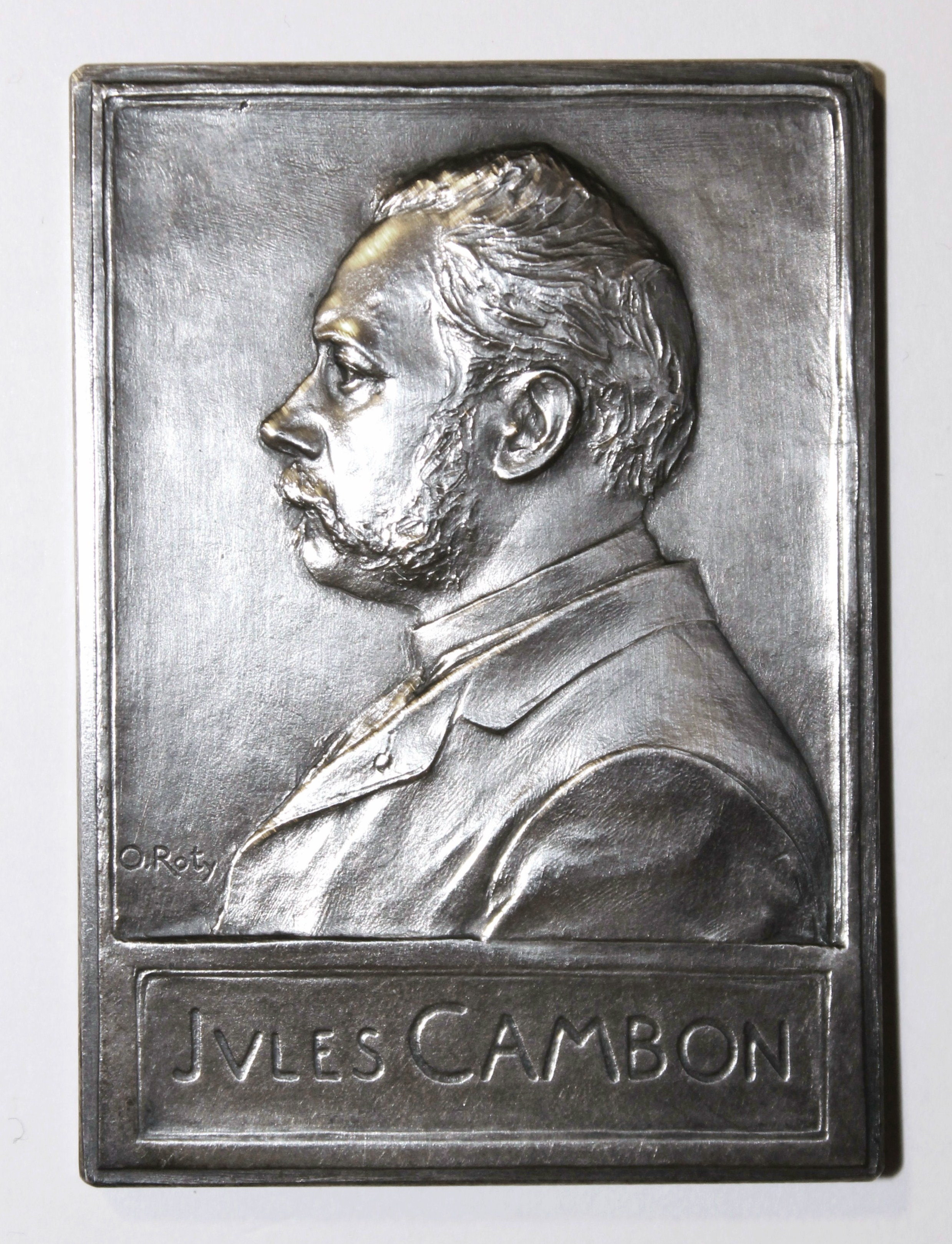 Médaille rectangulaire (53x43mm) de Jules Cambon (1845-1935), préfet du Rhône de 1887 à 1891, nommé gouverneur général de l'Algérie, ses amis Lyonnais, réalisée par le graveur Oscar Roty en 1892. (Collection personnelle)